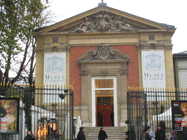 Façade du Musée du Luxembourg, Paris, France